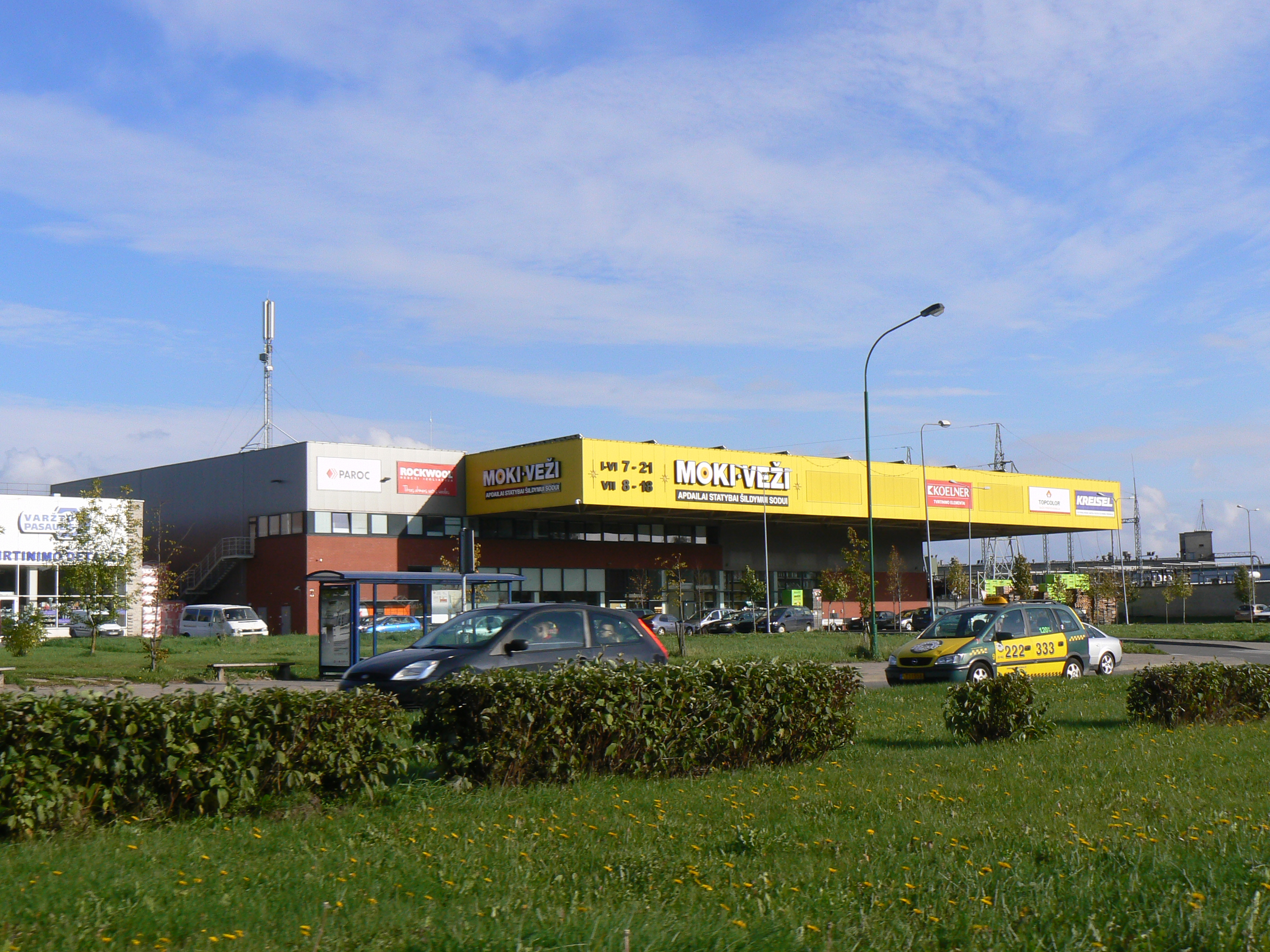 Velkoprodejna řetězce MOKI.VEŽI při třídě Šilutės plentas v Klaipėdě